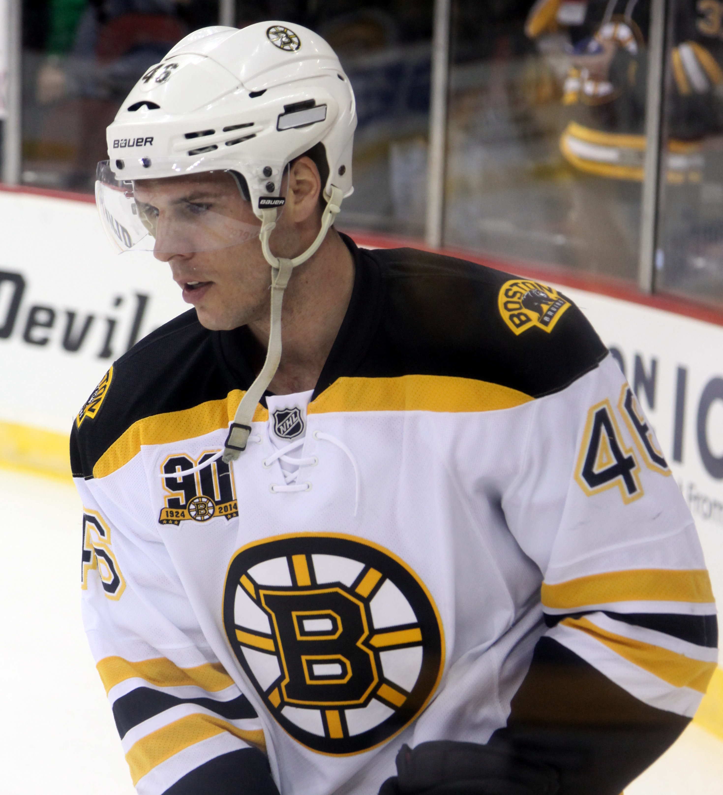 Krejci in 2014.